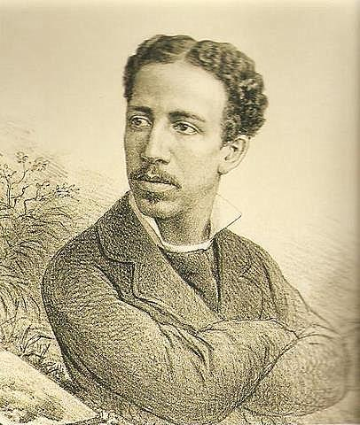 Antônio Firmino Monteiro, 1882, litografia